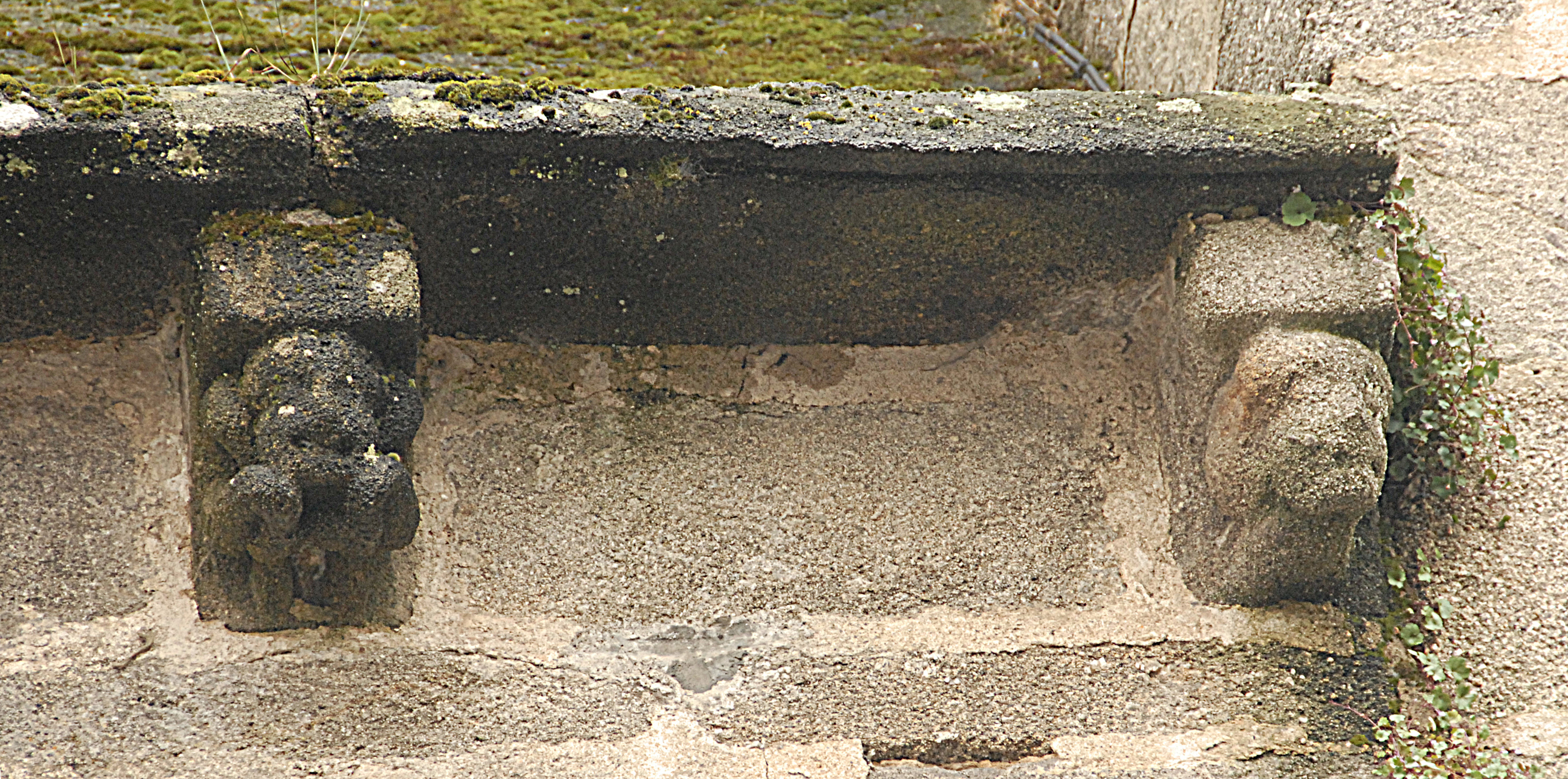 St-Pierre de Le Dorat, ehem. Trasufgesims auf Kragkonsdolen